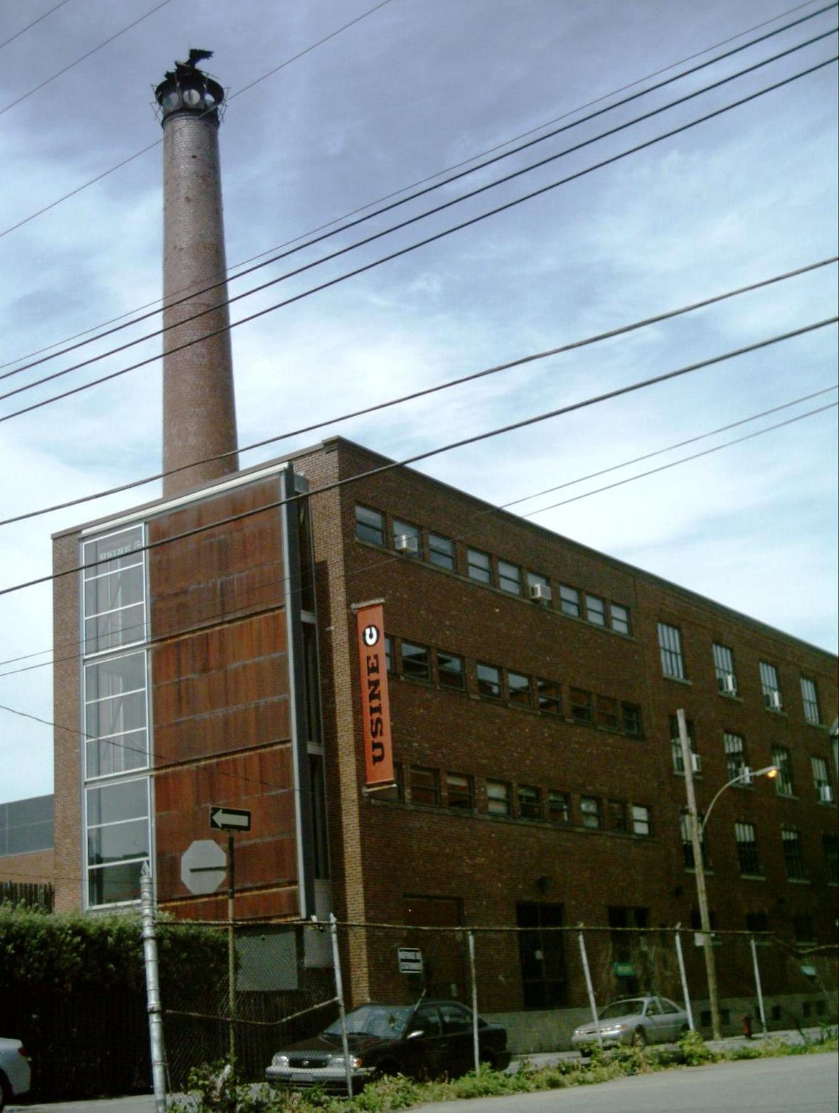 L'Usine C est une salle de spectacle située au 1345 rue Lalande à Montréal.